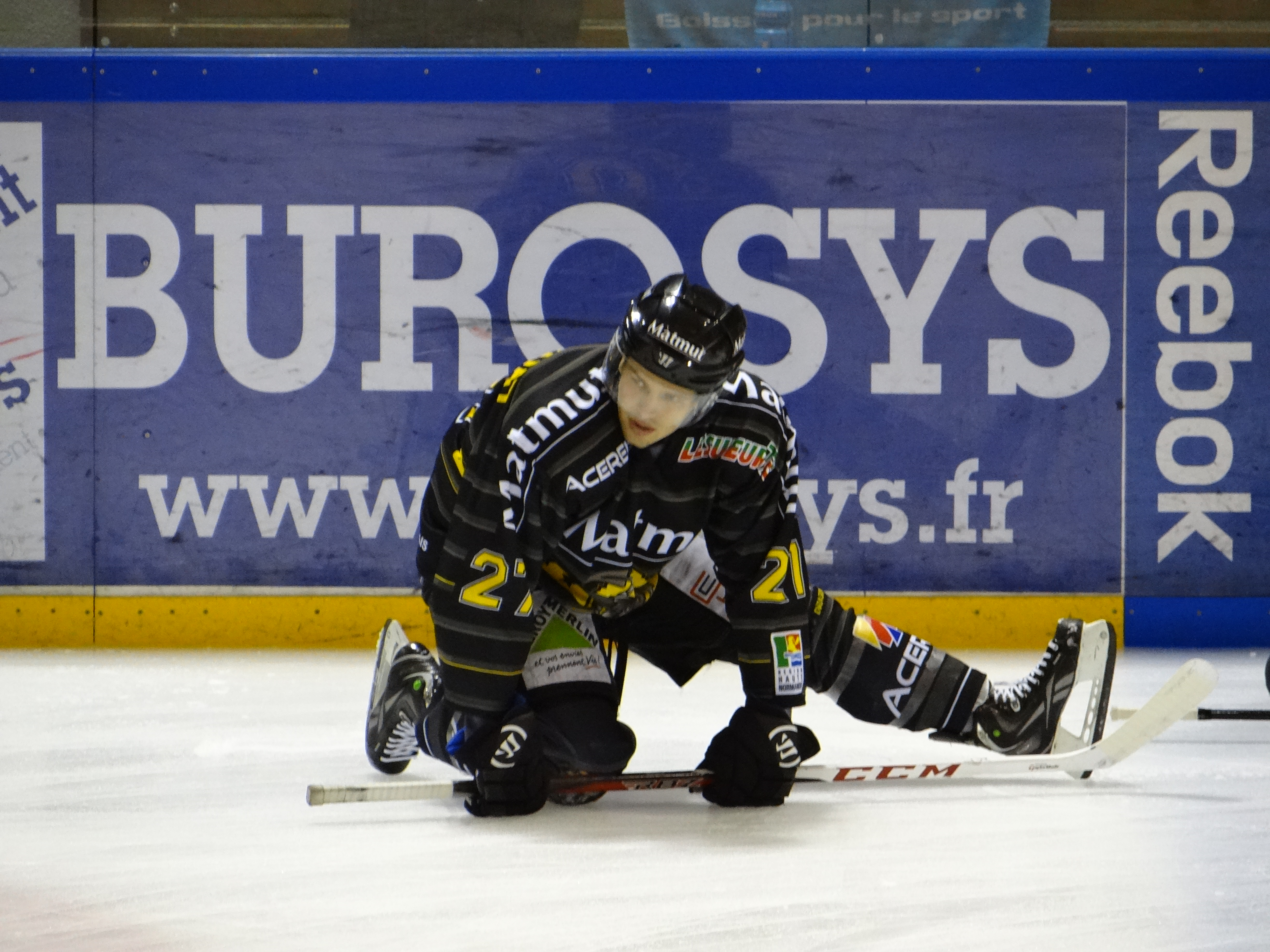 Photo du joueur lors d'un match avec Rouen contre Amien le 22 décembre 2012